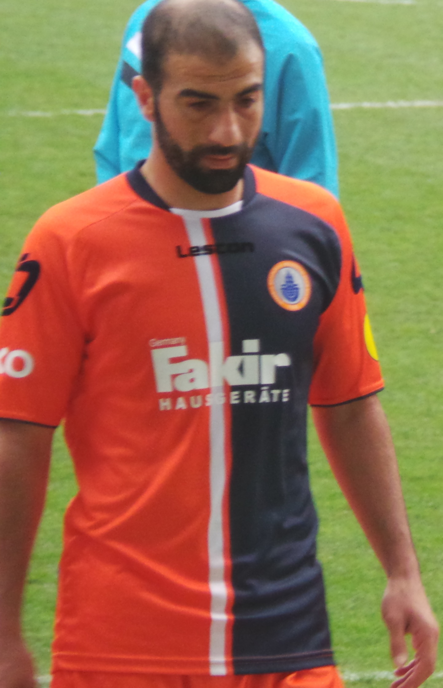 Sedat Ağçay